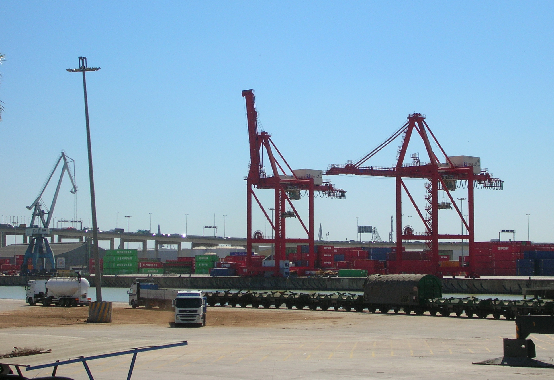 Vue sur le port de Séville. Au fond à gauche, on aperçoit le pont du Cinquième Centenaire